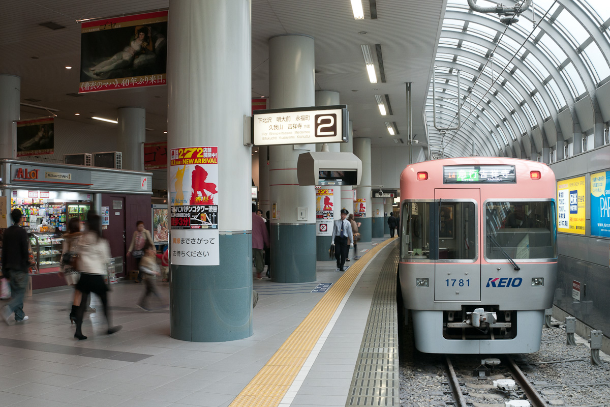 京王電鉄井の頭線渋谷駅。